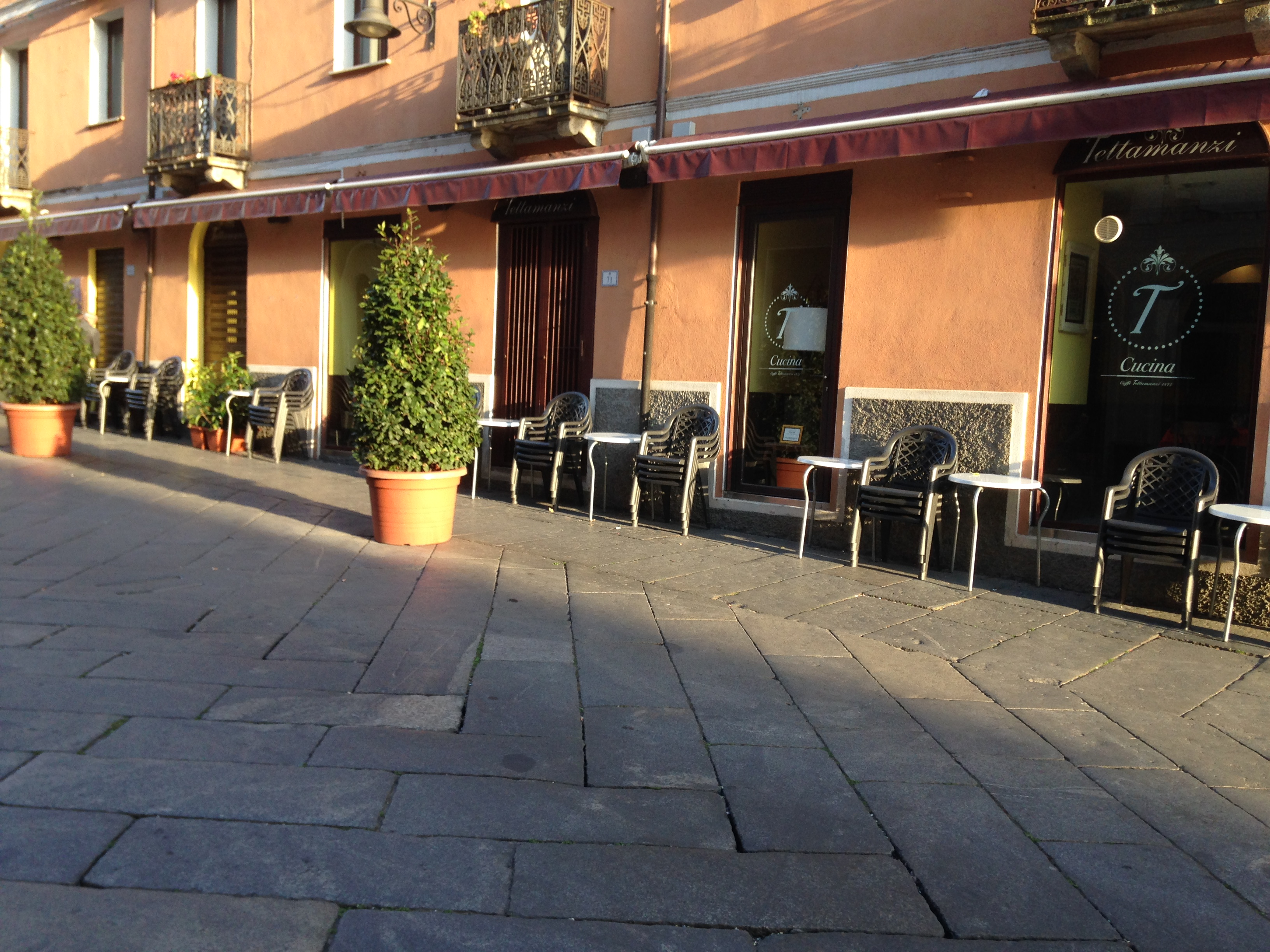 Storico Caffè Tettamanzi visto dall'esterno